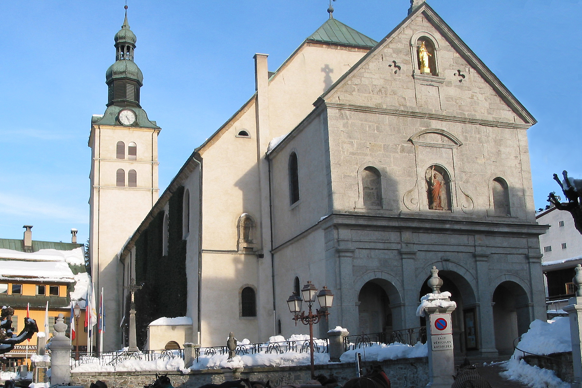 Megève (France), place de l'église.